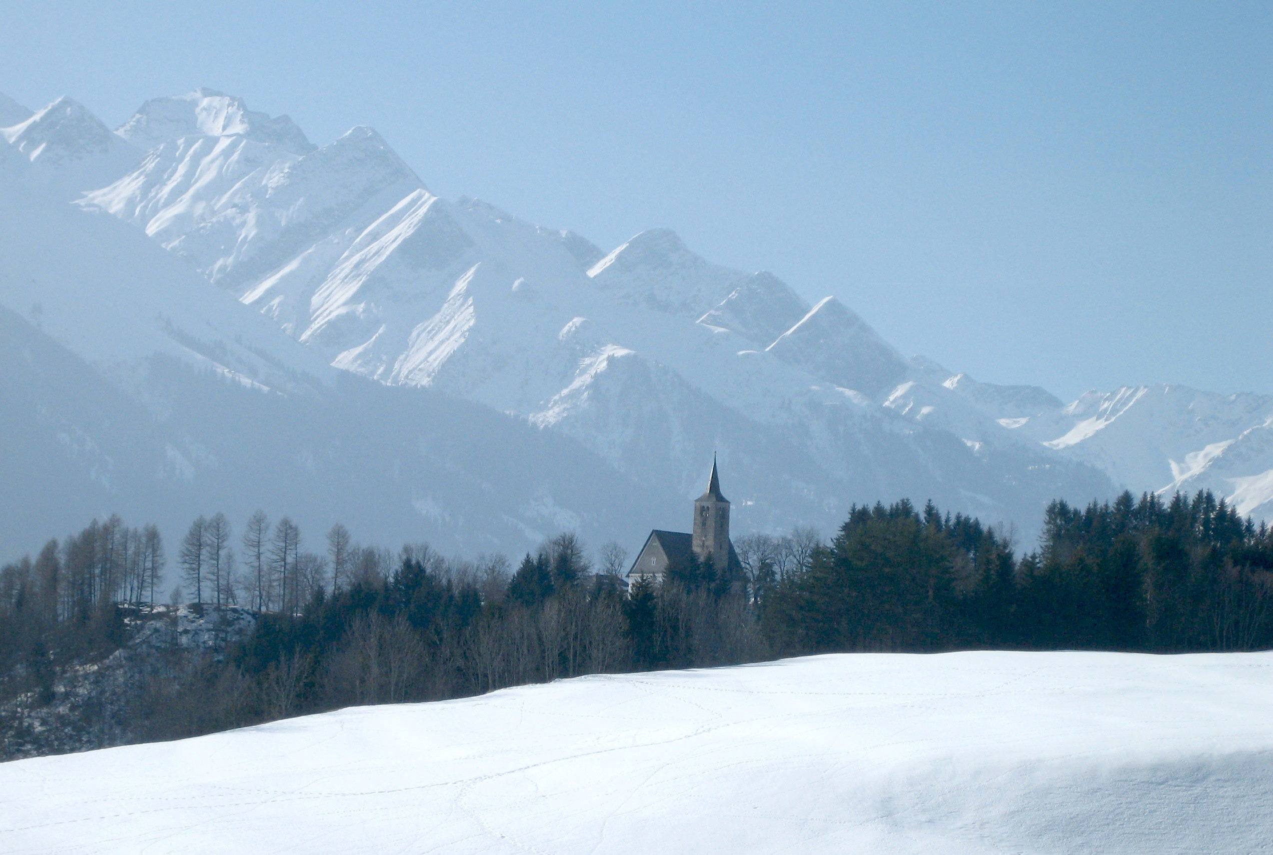 Kirche St.Vinzenz bei Vella GR